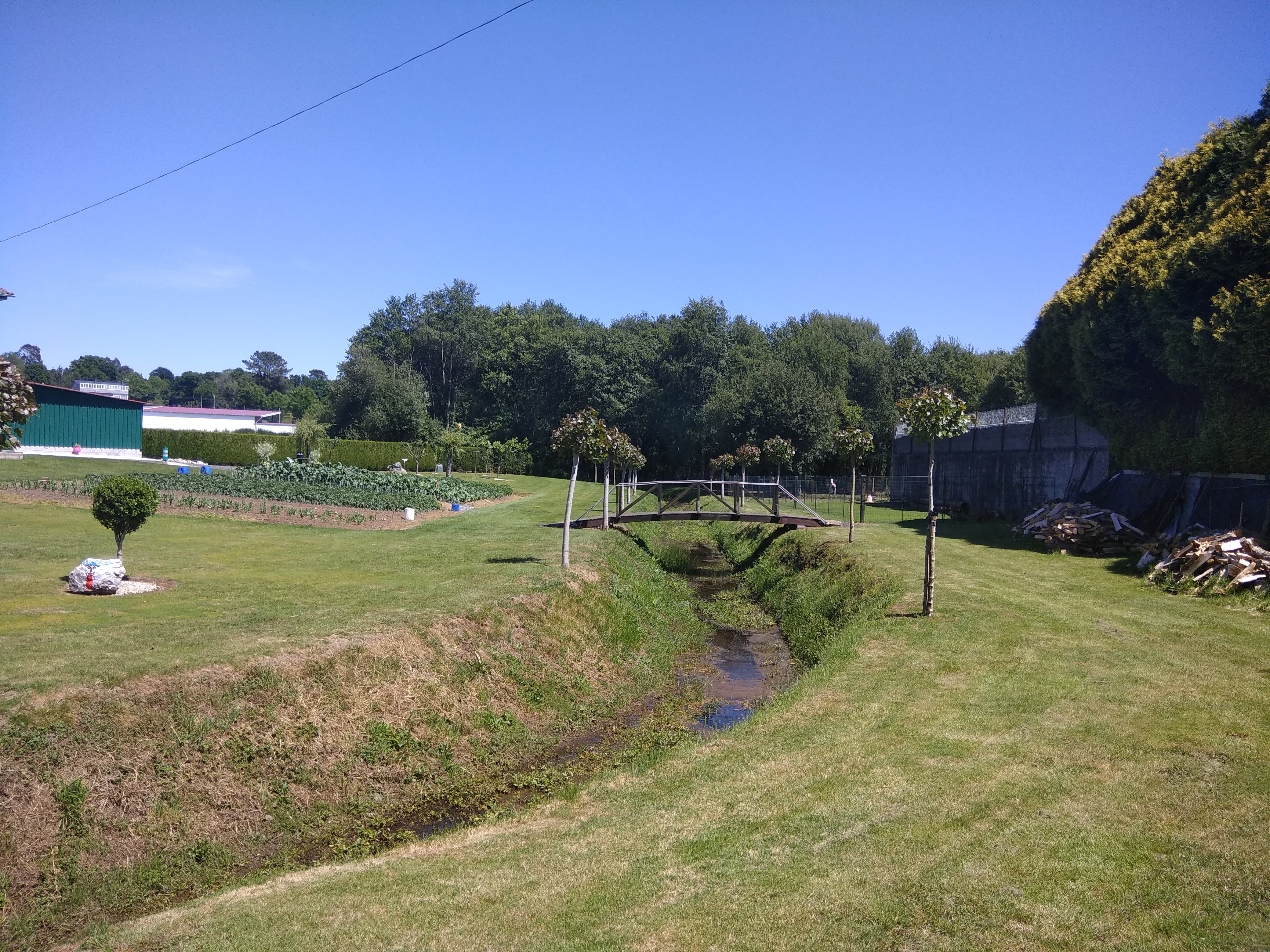 Pasarela en Teixeiro, Curtis, Galiza.